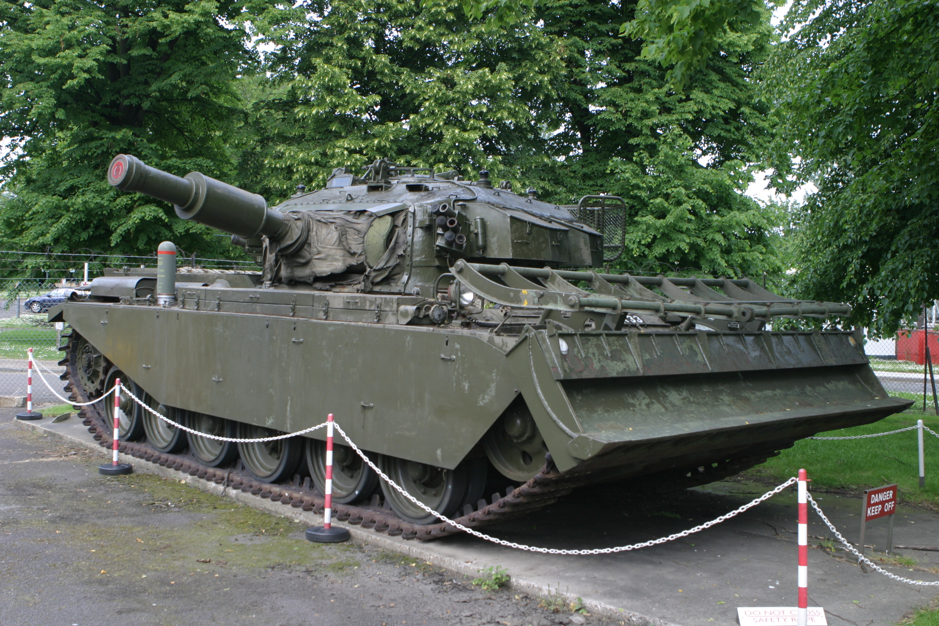 Photo d'un Armored Vehicule Royal Engineers de l'armée britannique prise au musée du génie britannique.